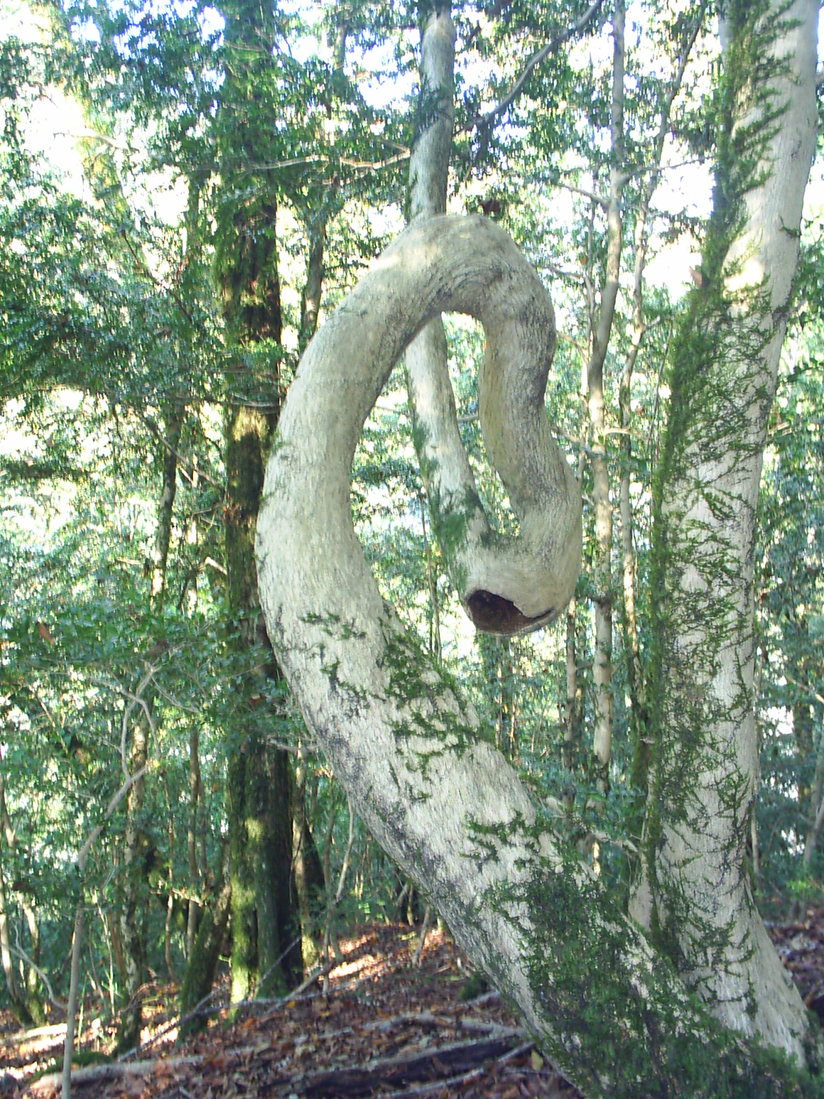 Самшит. Дзыхринское ущелье, Сочи This image is related to the protected area of Russia number 2320373